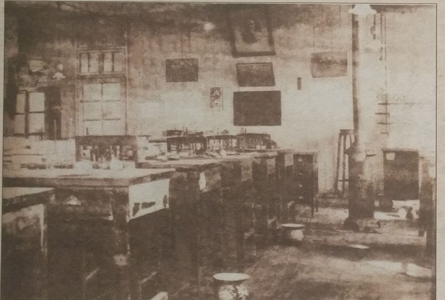 黄埔军校讨逆宣传办公室